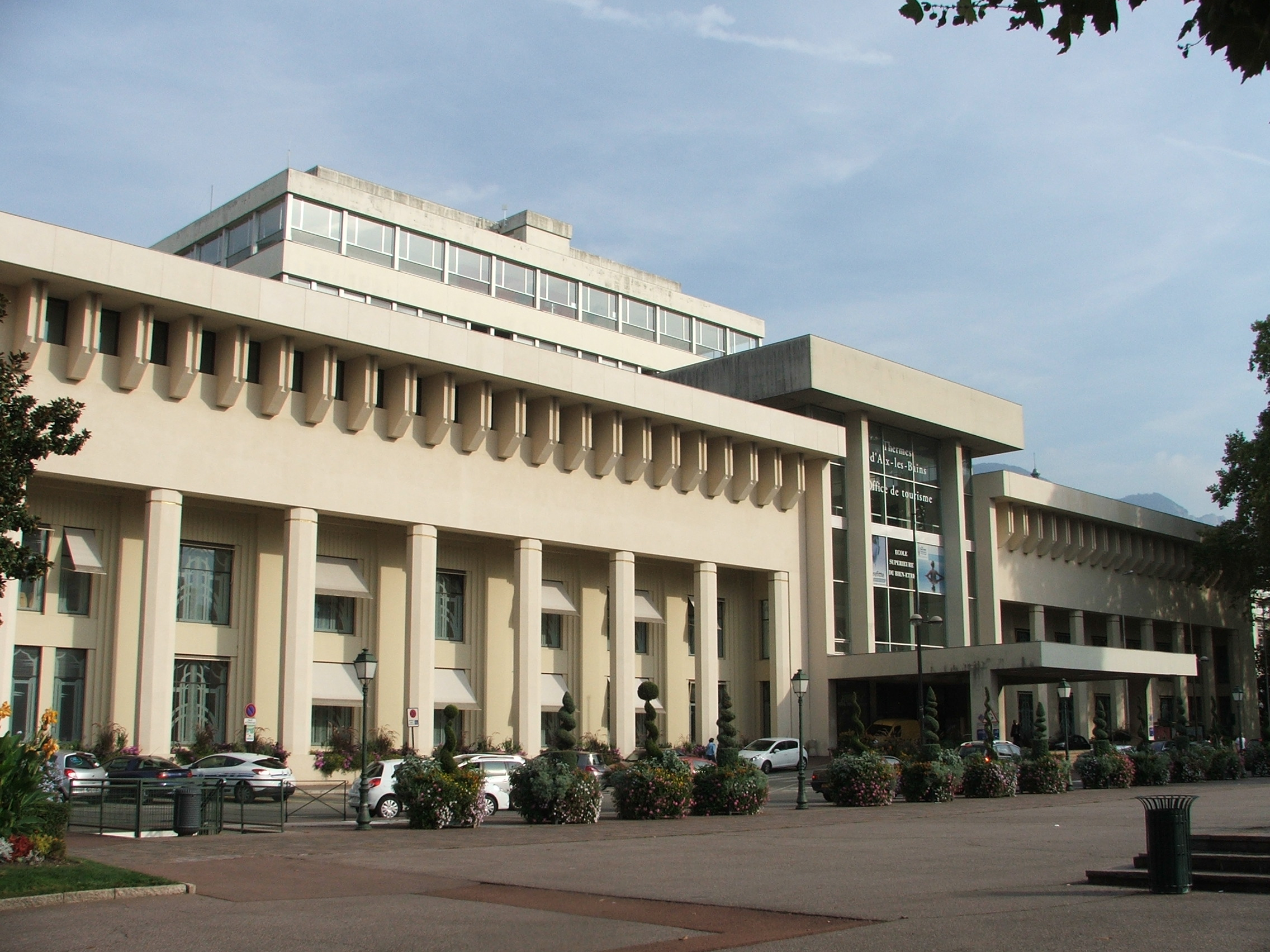 Façade des thermes d'Aix-les-Bains en 2011, de la partie dite "thermes Pétriaux" construite en 1933, et l'extension "Mabileau" batie au-dessus dans les années 70. .